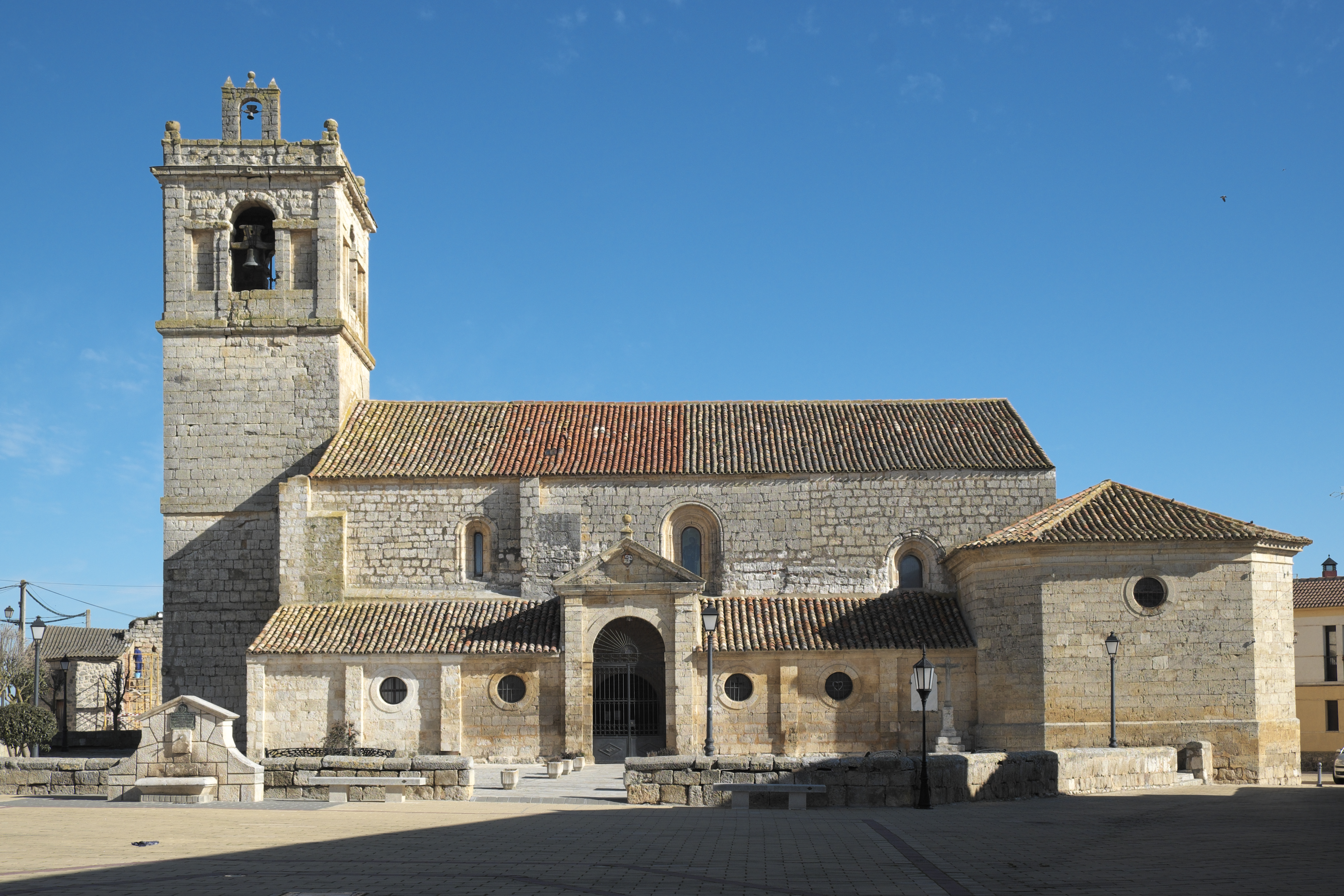 Katholische Kirche Santiago (Jakobus der Ältere) in Villalba de los Alcores in der Provinz Valladolid (Kastilien-León/Spanien)